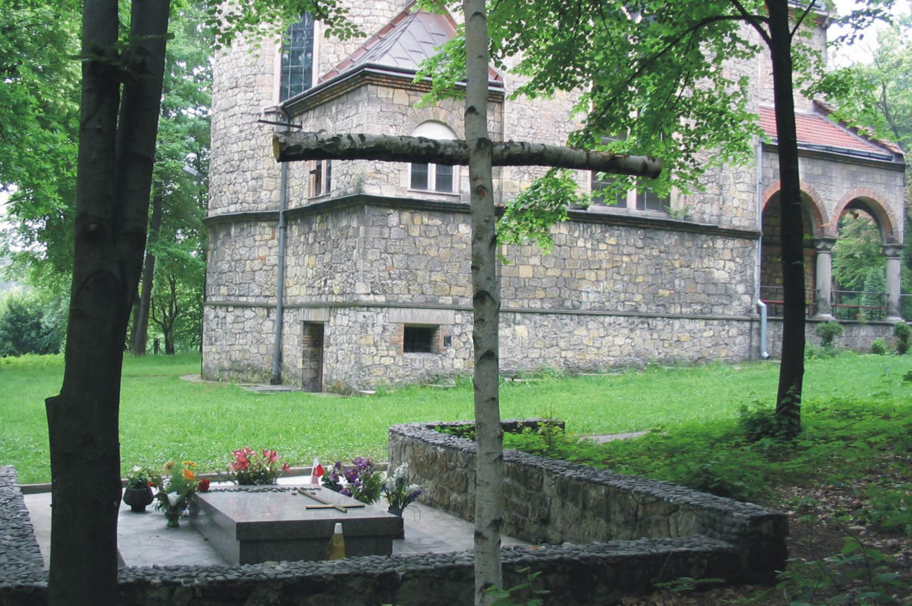 Grób Ks. Michała Potaczały proboszcza Parafi MB Ostrobramskiej w Chrzanowie